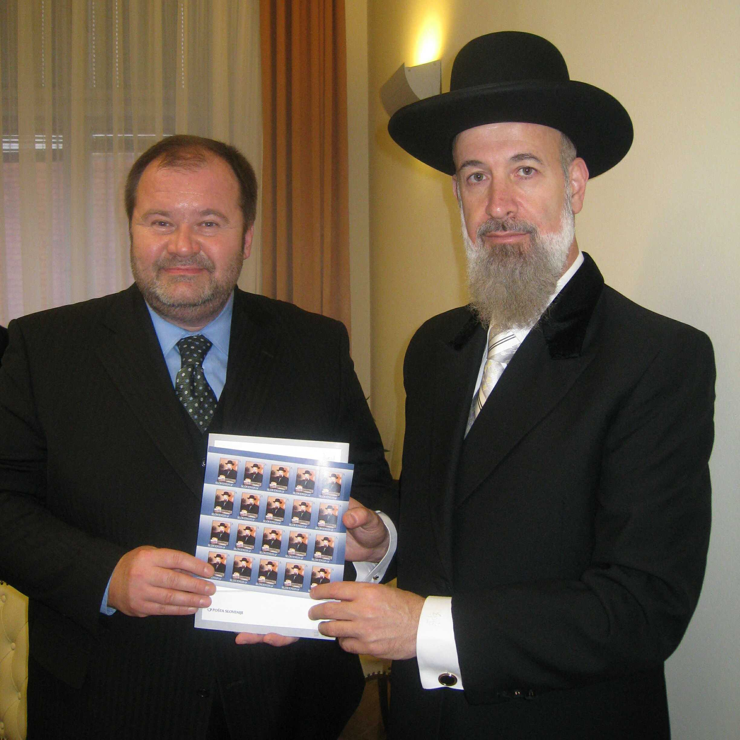 שר הדואר הסלובני מעניק לרב הראשי לישראל יונה מצגר גיליון בולים. הבול הונפק לרגל ביקורו של הרב בסלובניה במסגרת חגיגת חנוכת בית הכנסת שנגאל במריבור שבסלובניה, בראשו עמד בעבר רבי ישראל איסרלן.